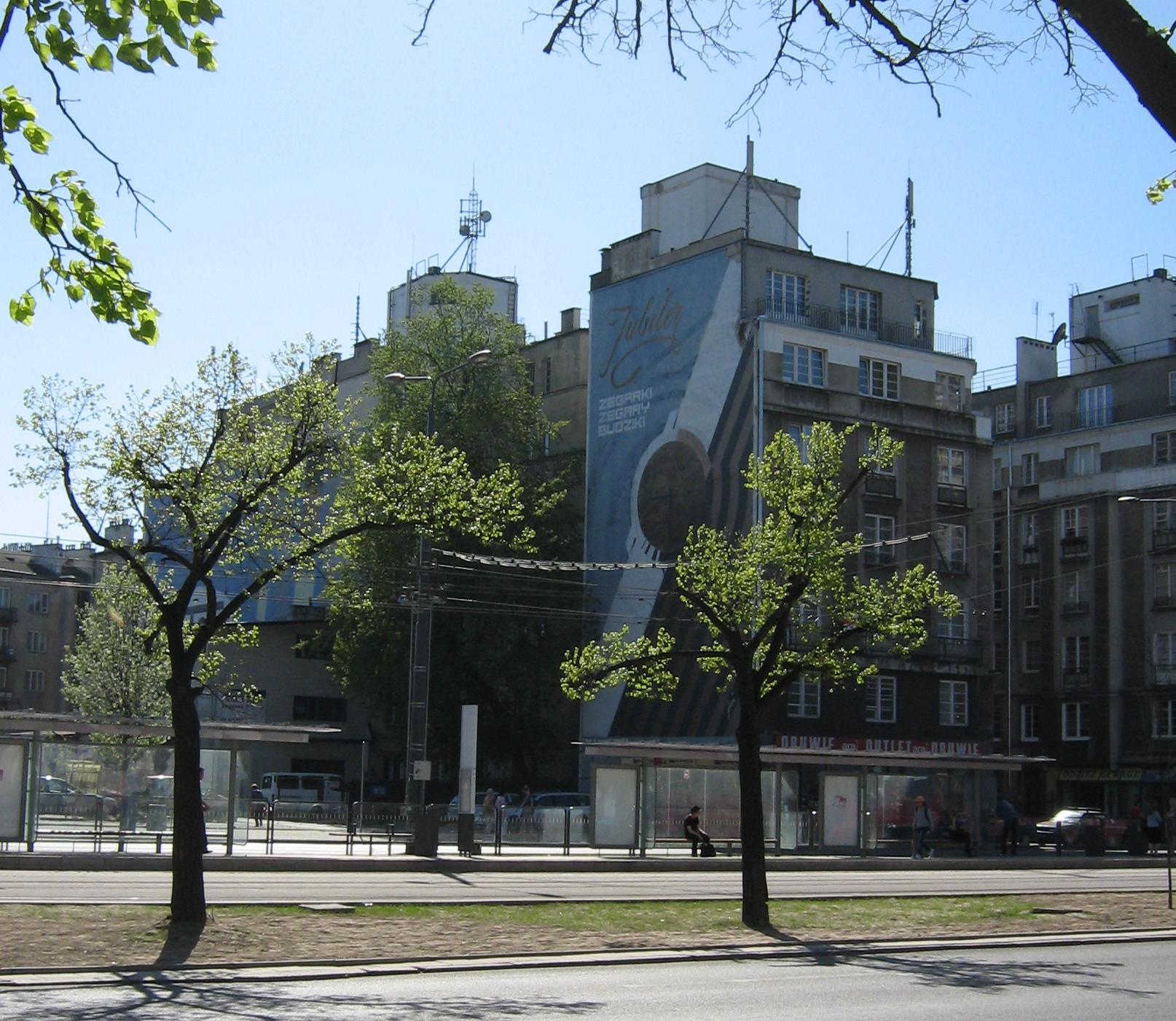 Kamienica Jaroszyńskiego, ul. Targowa 15 w Warszawie